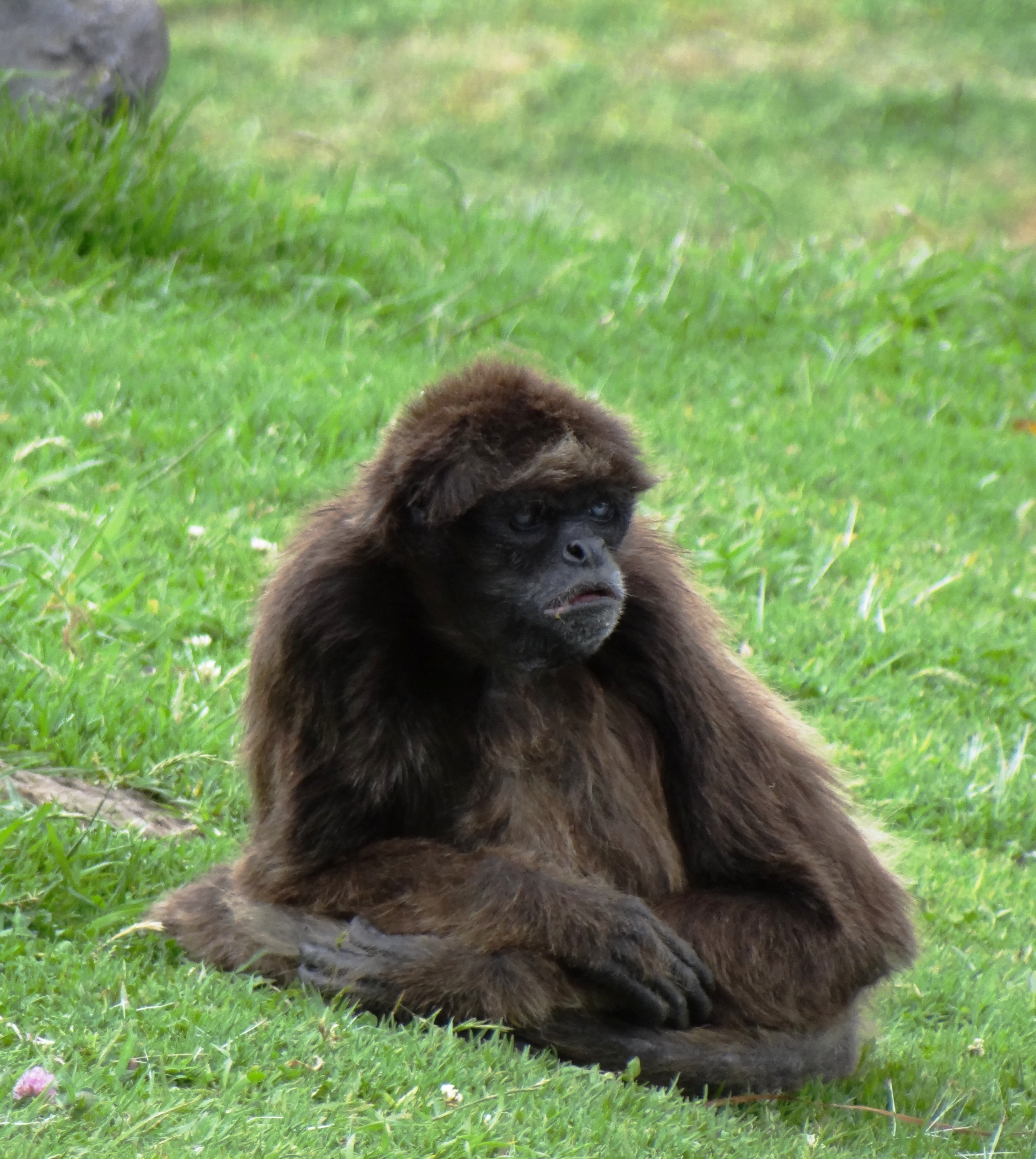 Mono araña (Ateles hybridus) en el zoológico del Parque Jaime Duque, Cundinamarca, Colombia.